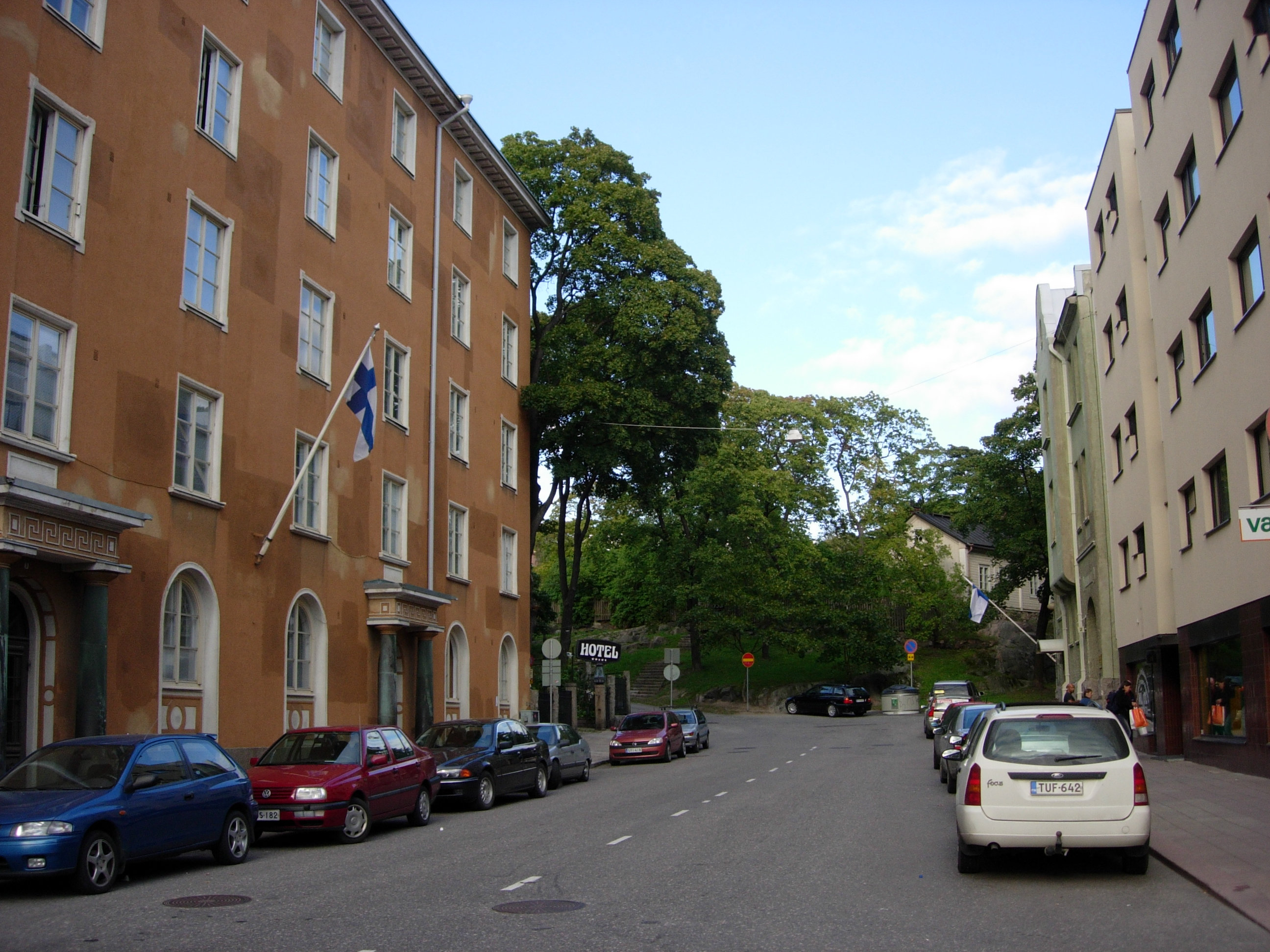 Rauhankatu 1 (vasemmalla) ja 2 (oikealla), Turku.